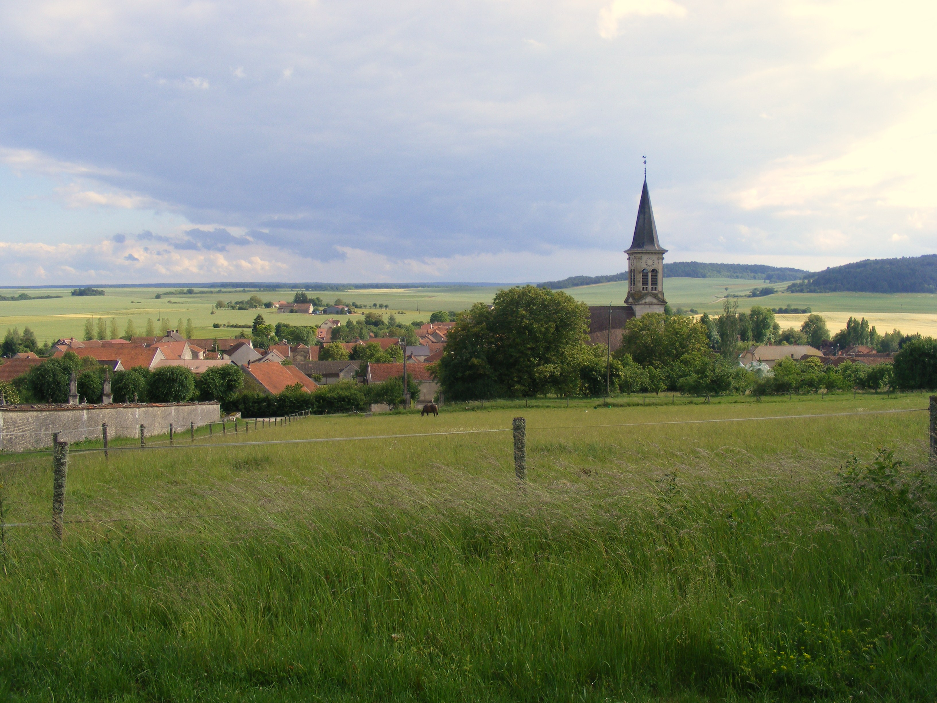 Vue générale du village de Latrecey